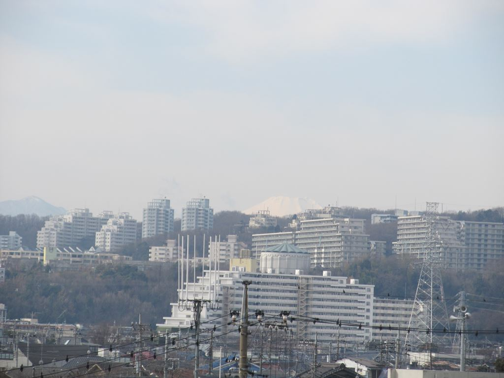 調布市多摩川より稲城市方向。富士山。ニュータウン。